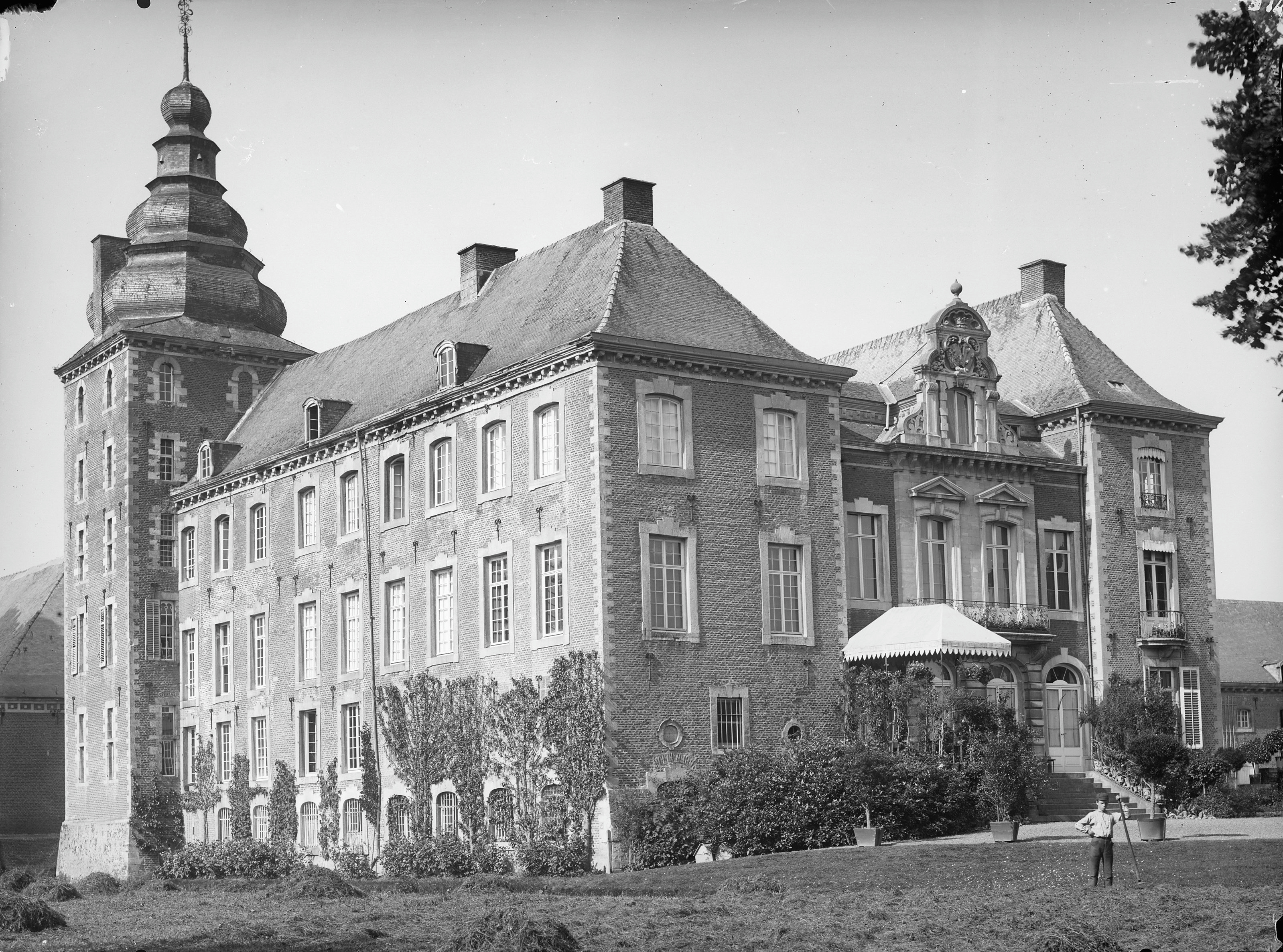 Kasteel Neubourg: exterieur (opmerking: Fotonummer 1899)